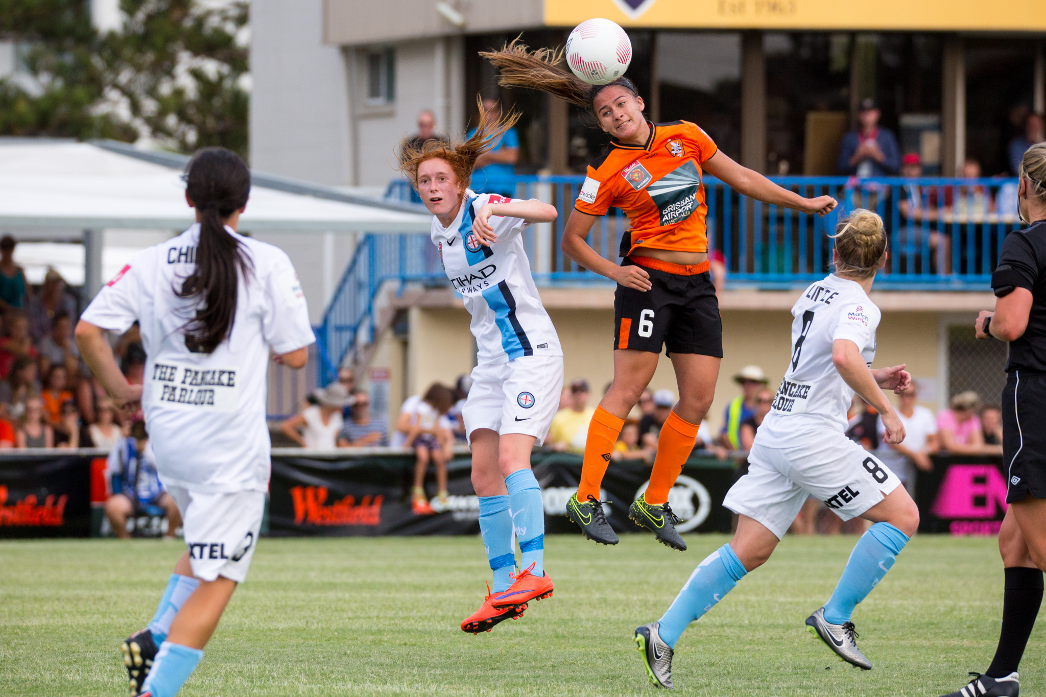 Angela Beard